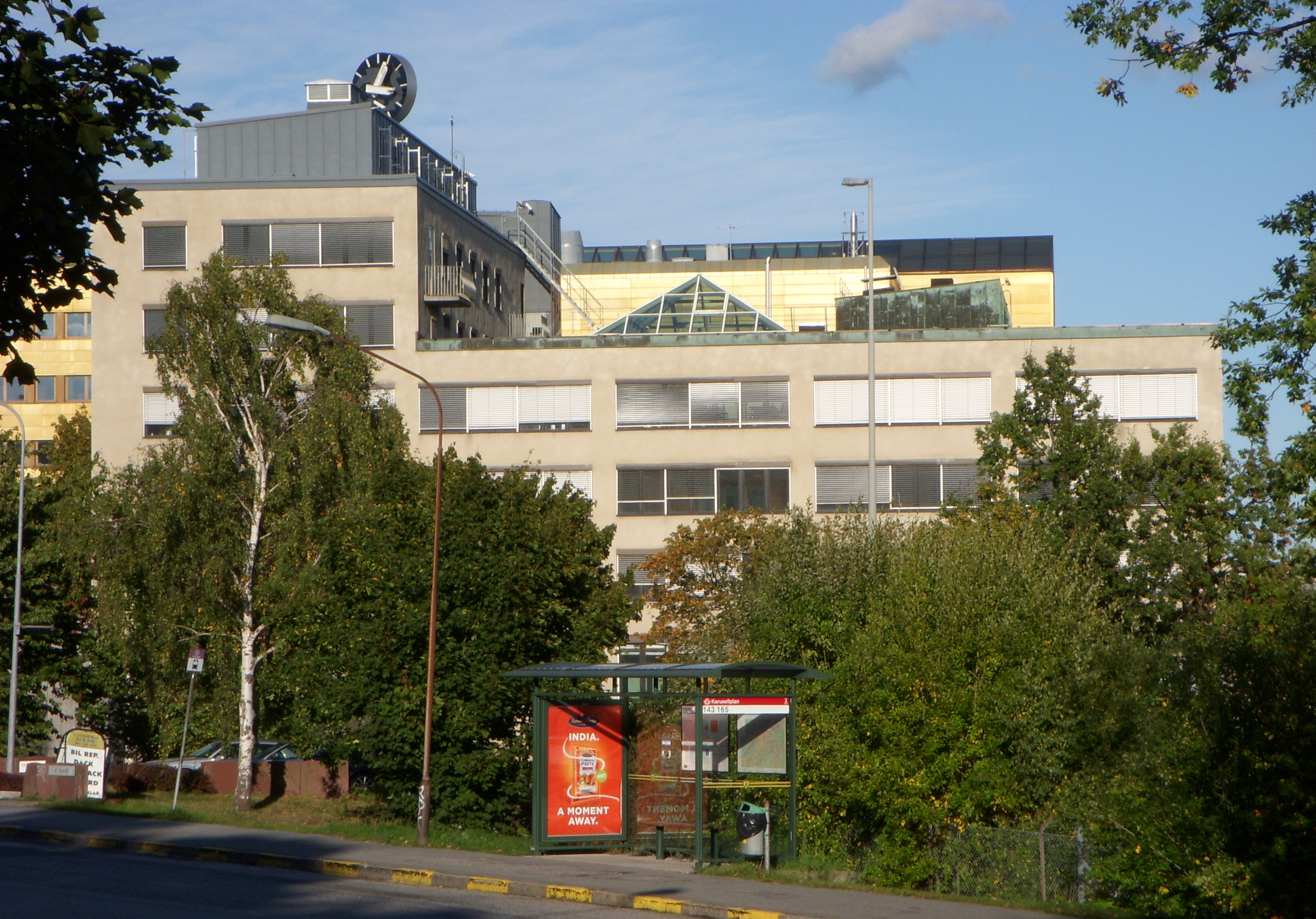 Före detta G4S byggnad i Västberga, Stockholm, Vretensborgsvägen 32, Västberga allé 11, byggd 1957 - 1967, Georg Scherman (Arkitekt)